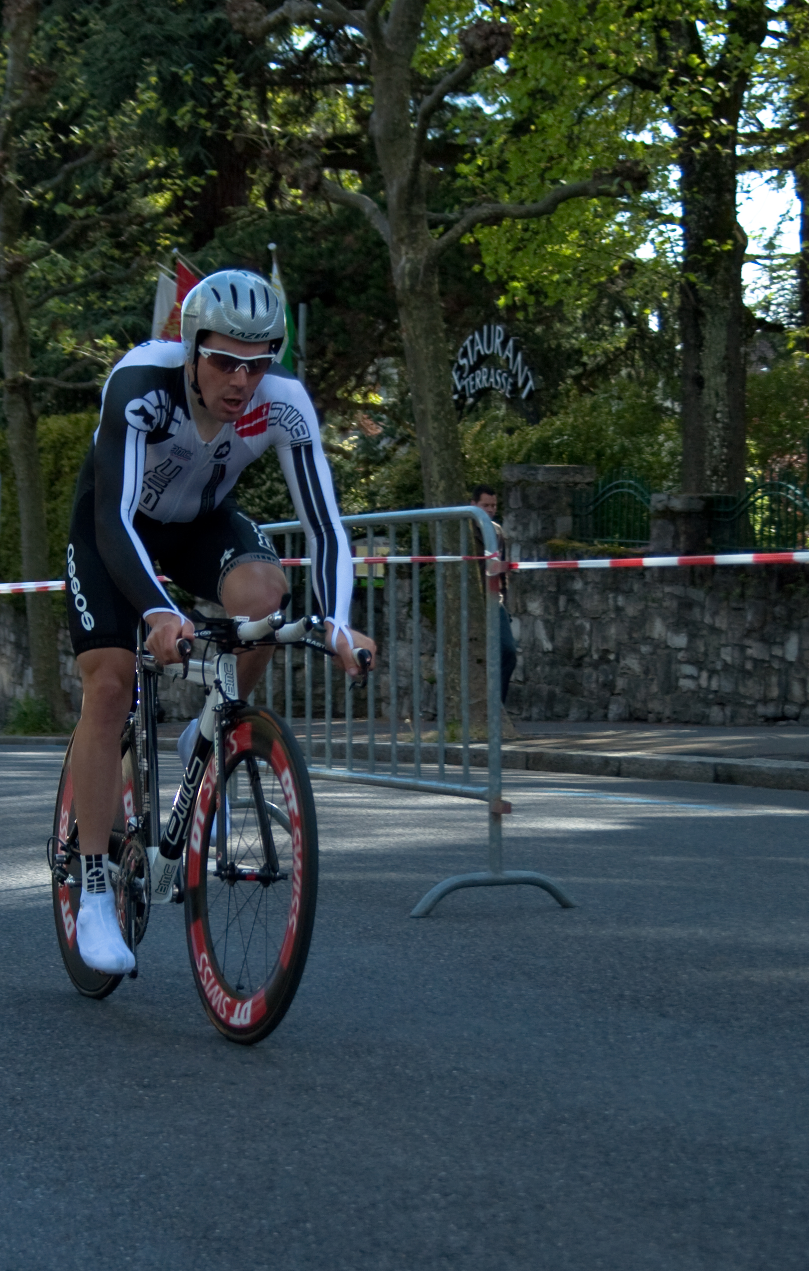 Ian McKissick lors du prologue du Tour de Romandie 2009